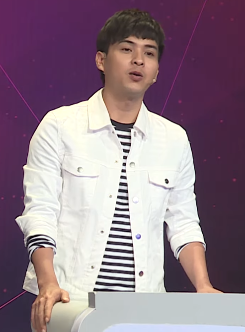 Hồ Quang Hiếu, ảnh chụp màn hình từ video của BEE Entertainment / Giải Trí (screen capture from video of BEE Entertainment / Giải Trí)